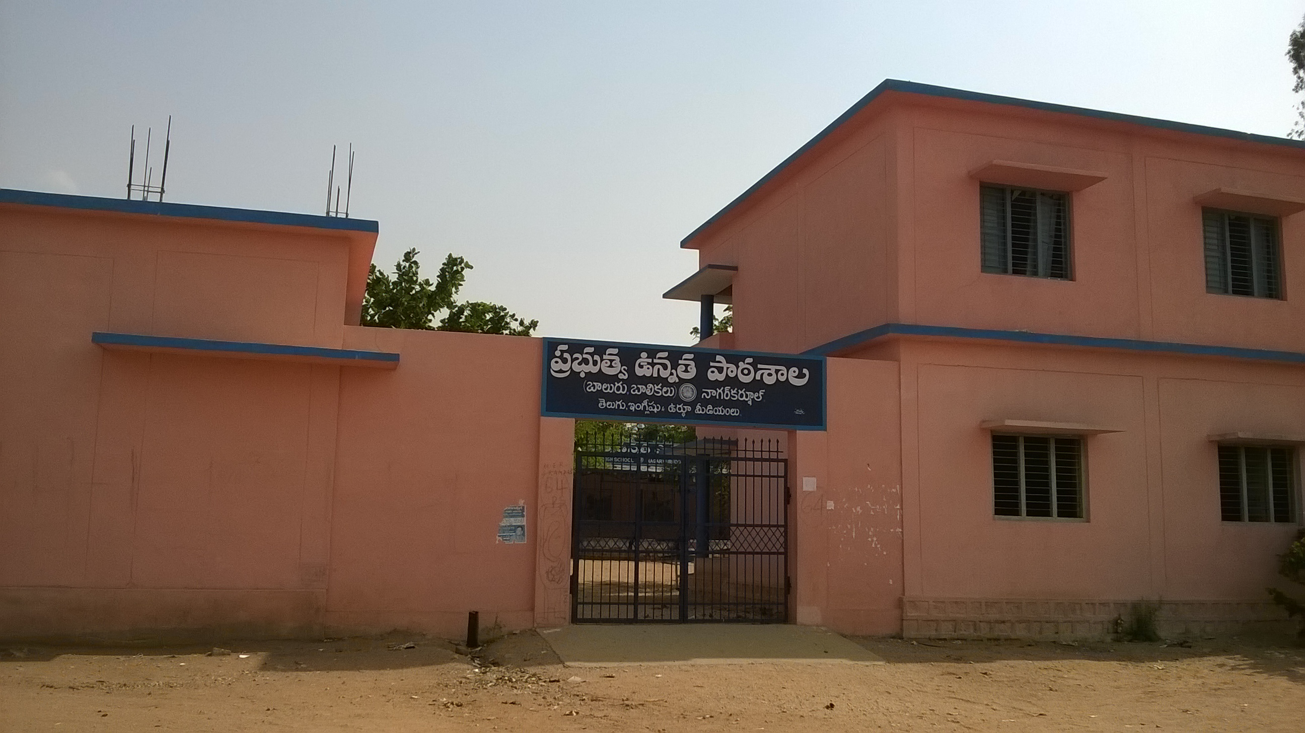 ప్రభుత్వ ఉన్నత పాఠశాల, నాగర్‌కర్నూలు